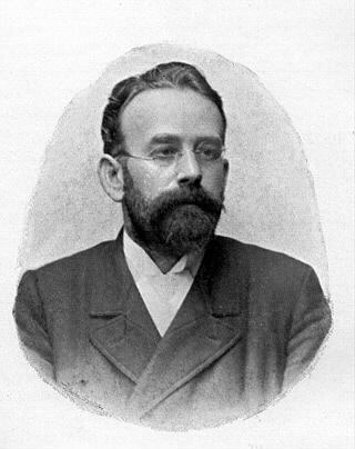 Antonín Sucharda (1854 - 1907), Český matematik a vysokoškolský profesor.